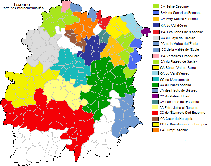 Carte des intercommunalités en Essonne en 2010.